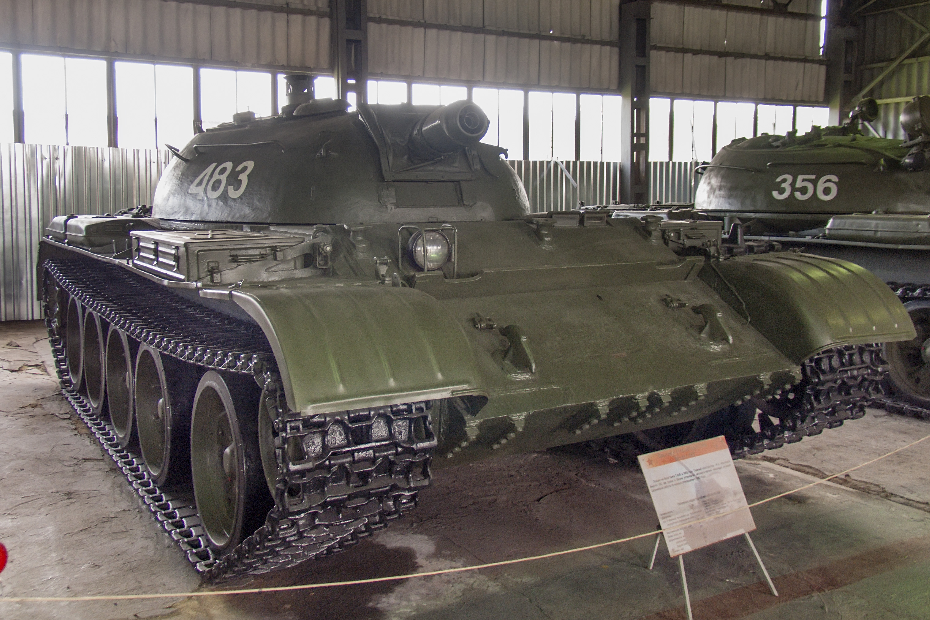 Опытный огнеметный танк объект 483 в Центральном музее бронетанкового вооружения и техники в Кубинке.